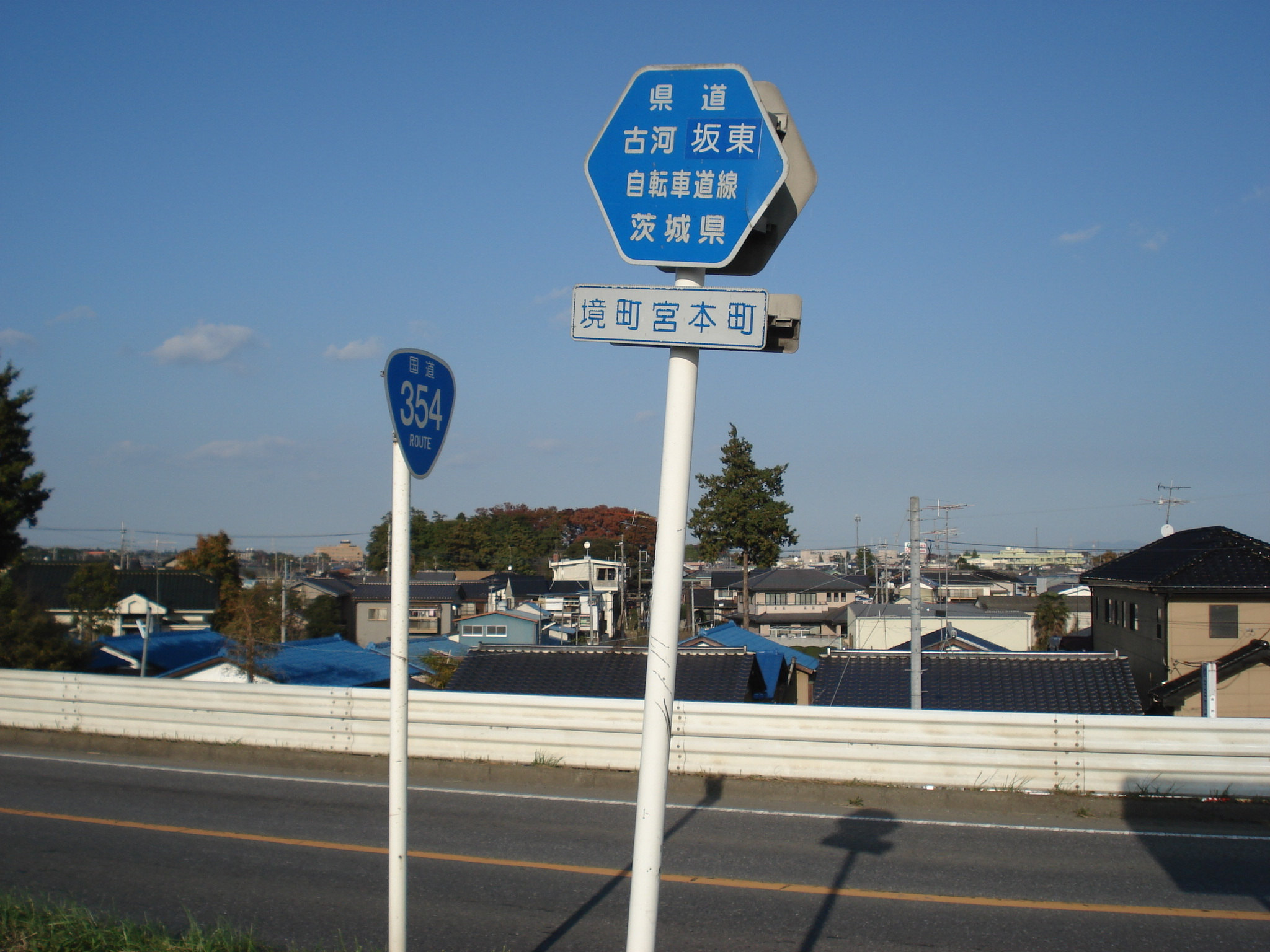 茨城県道504号古河坂東自転車道線 茨城県猿島郡境町